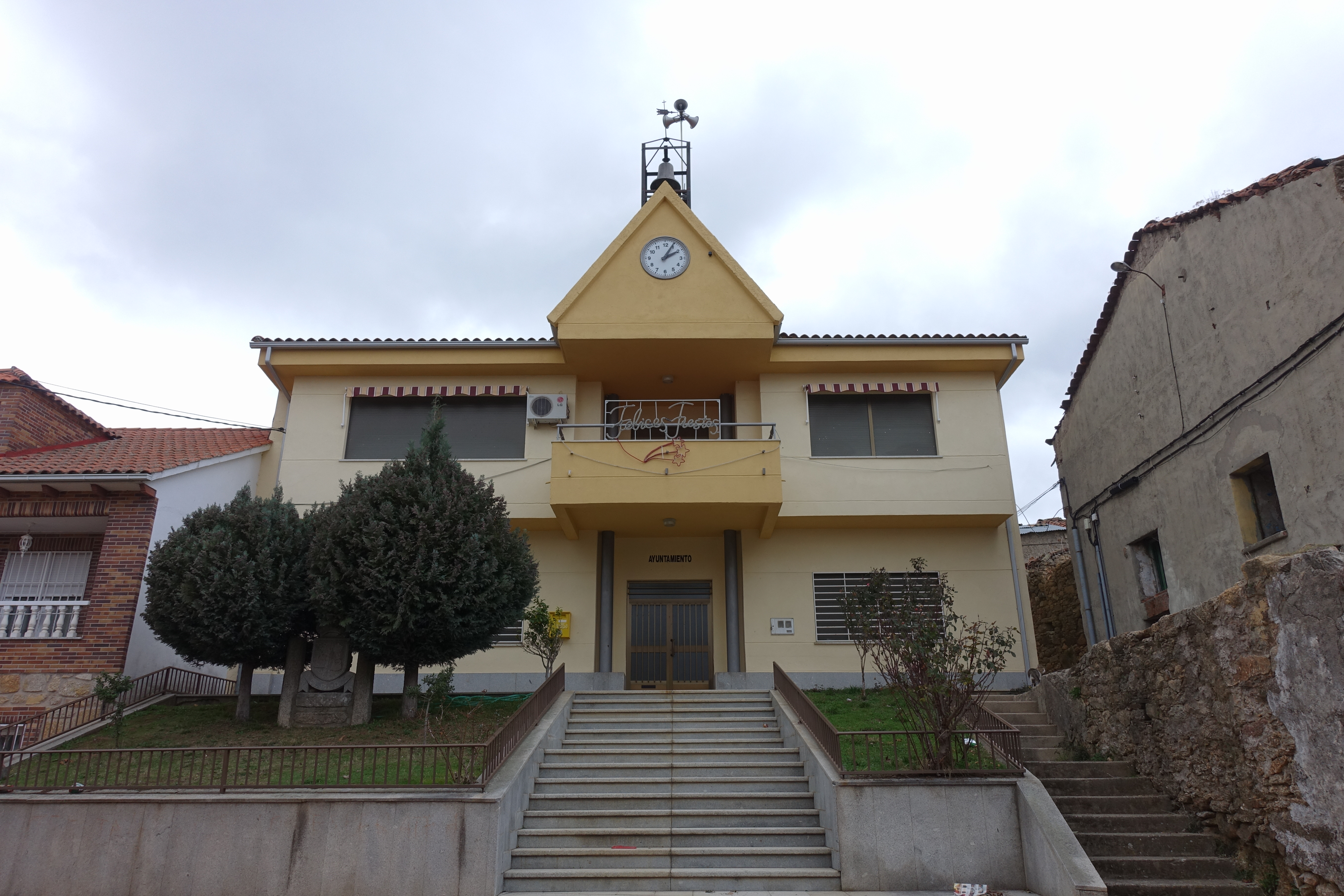 Casa consistorial de El Payo (Salamanca, España).